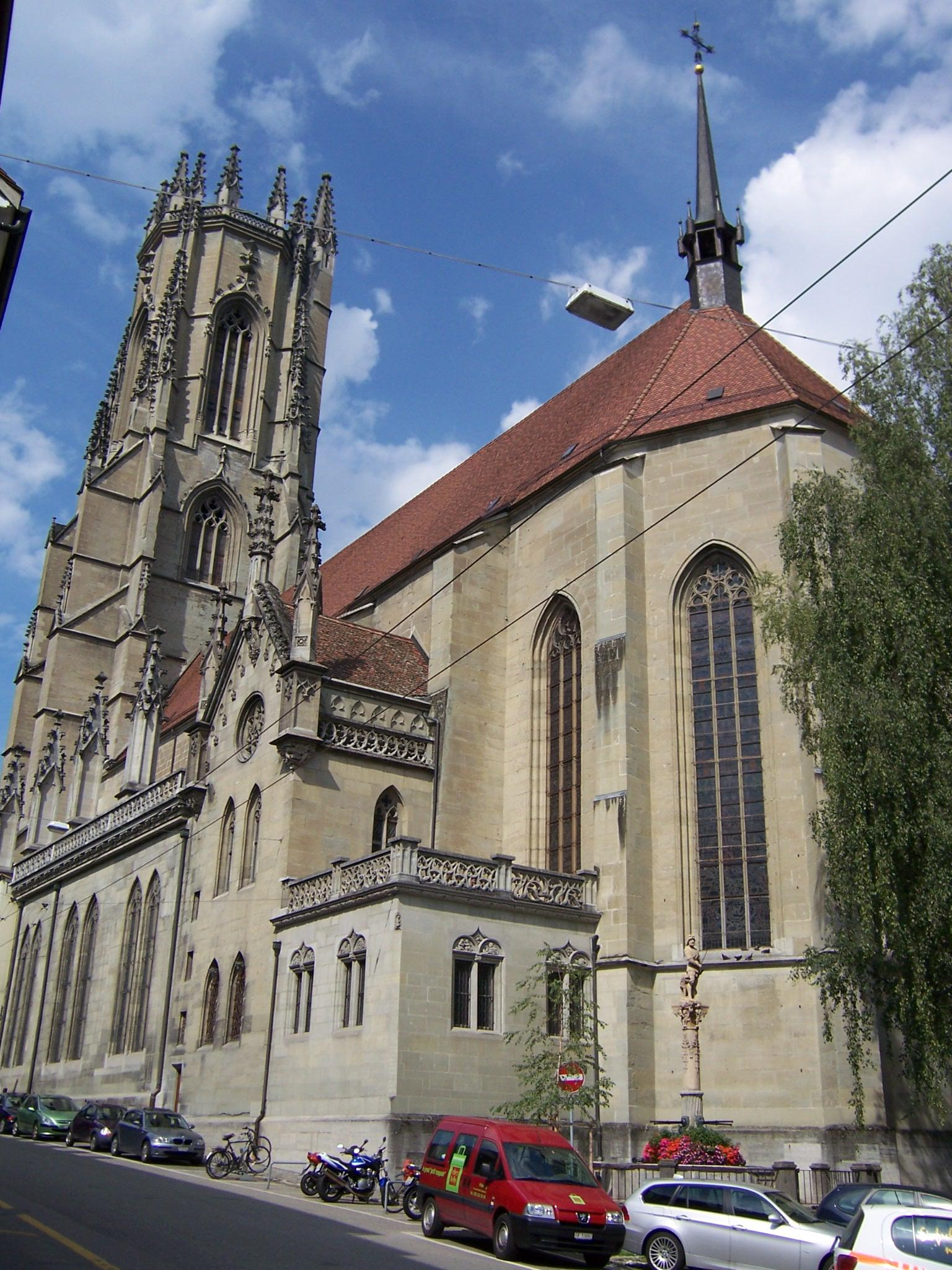 Kathedrale Sankt Nikolaus in Freiburg im Üechtland (Fribourg; Kanton Freiburg / Fribourg, Schweiz) eigene Aufnahme vom 7. September 2006